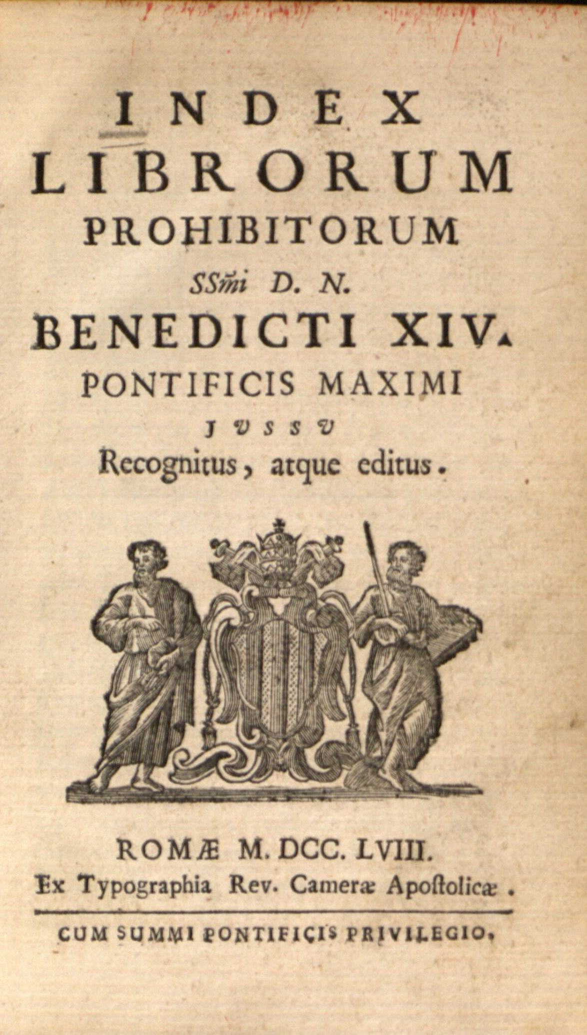 Index Librorum Prohibitorum, aggiornato sotto papa Benedetto XIV, Roma 1758